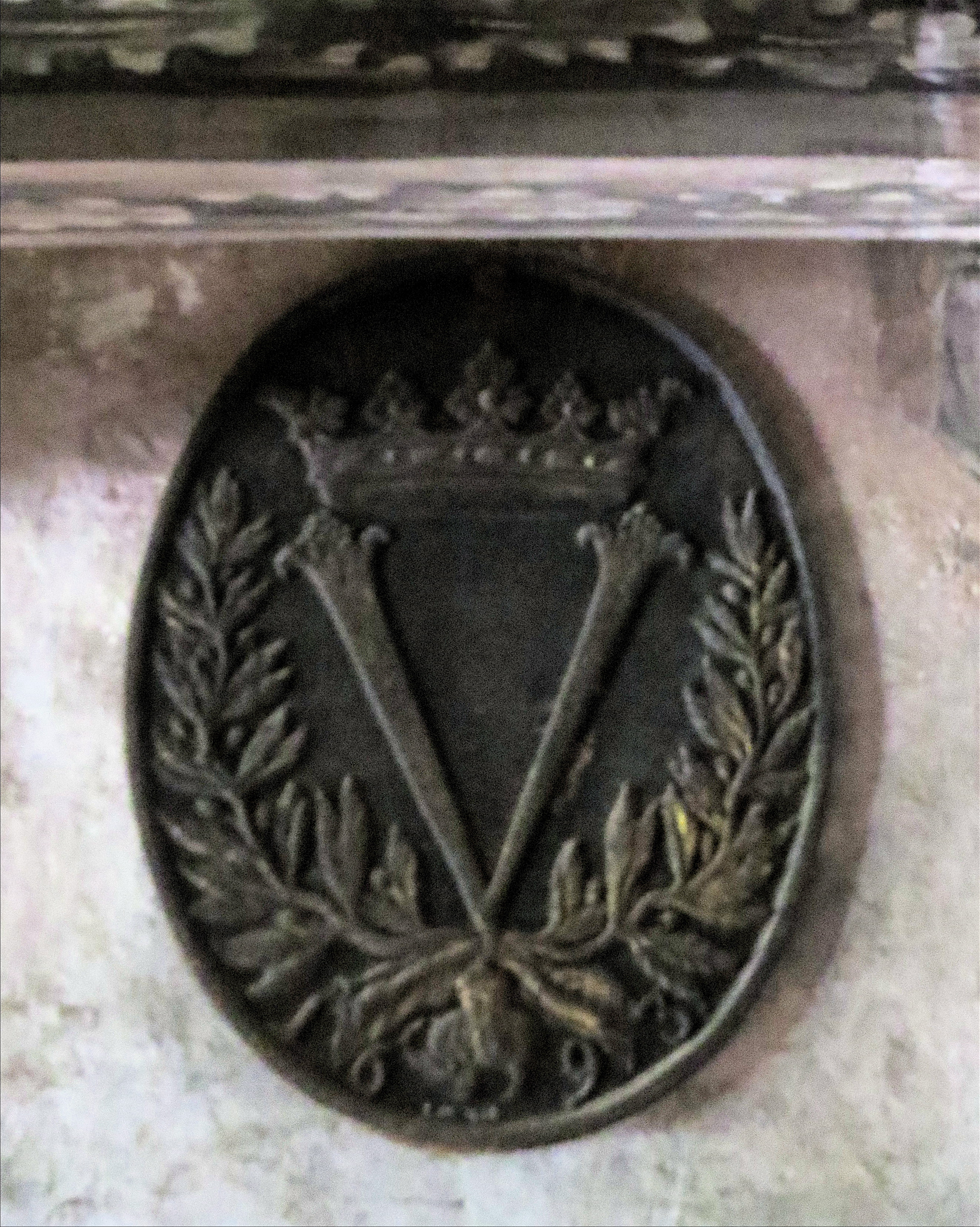 Ulrik Frederik Gyldenløves monogram i Elefantordenen, fra Herregården i Larvik, Norge